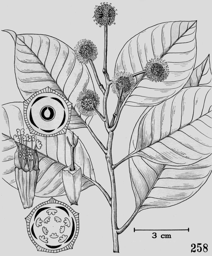 Camptotheca acuminata, feuilles, inflorescences, fleur, fruit